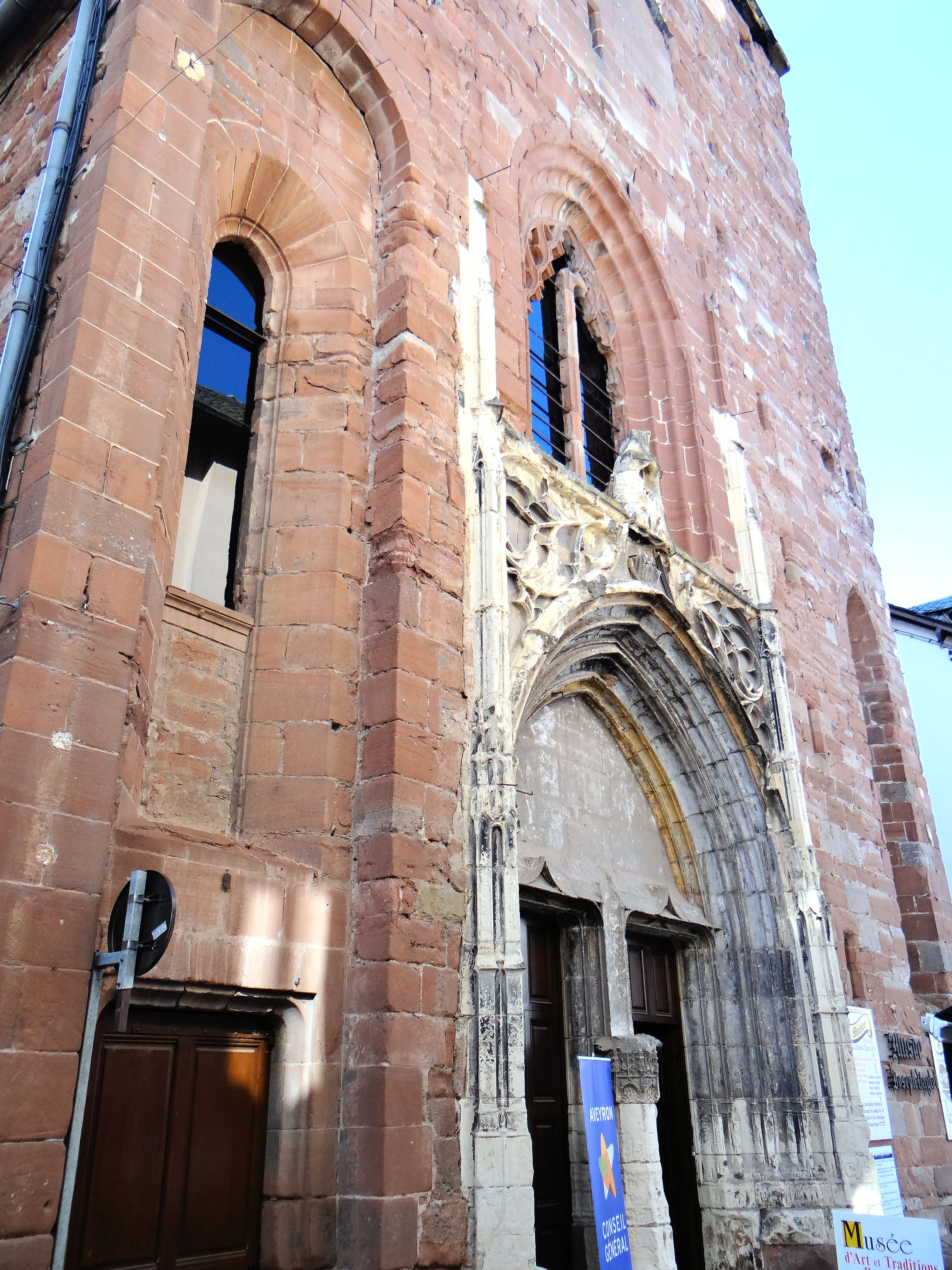 Espalion - Musée Joseph Vaylet - Façade de l'ancienne église Saint-Jean-Baptiste avec le portail réalisé en 1508 par Antoine Salvanh .